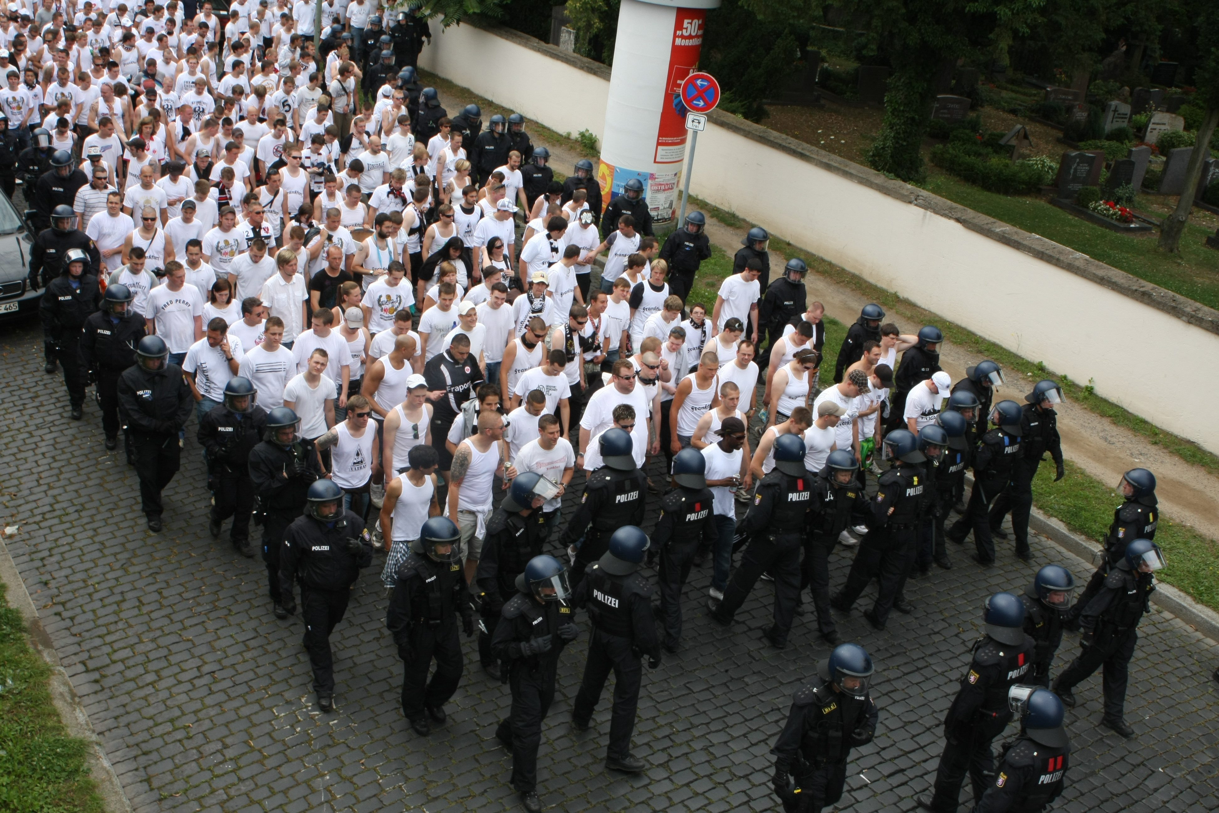 Hooligans des Fußballvereins Eintracht Frankfkurt auf dem Weg zu einem Lokalderby (gegen Offenbach, August 2009).